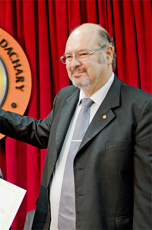 Ing. Luís Enrique Lichowski en la UGD